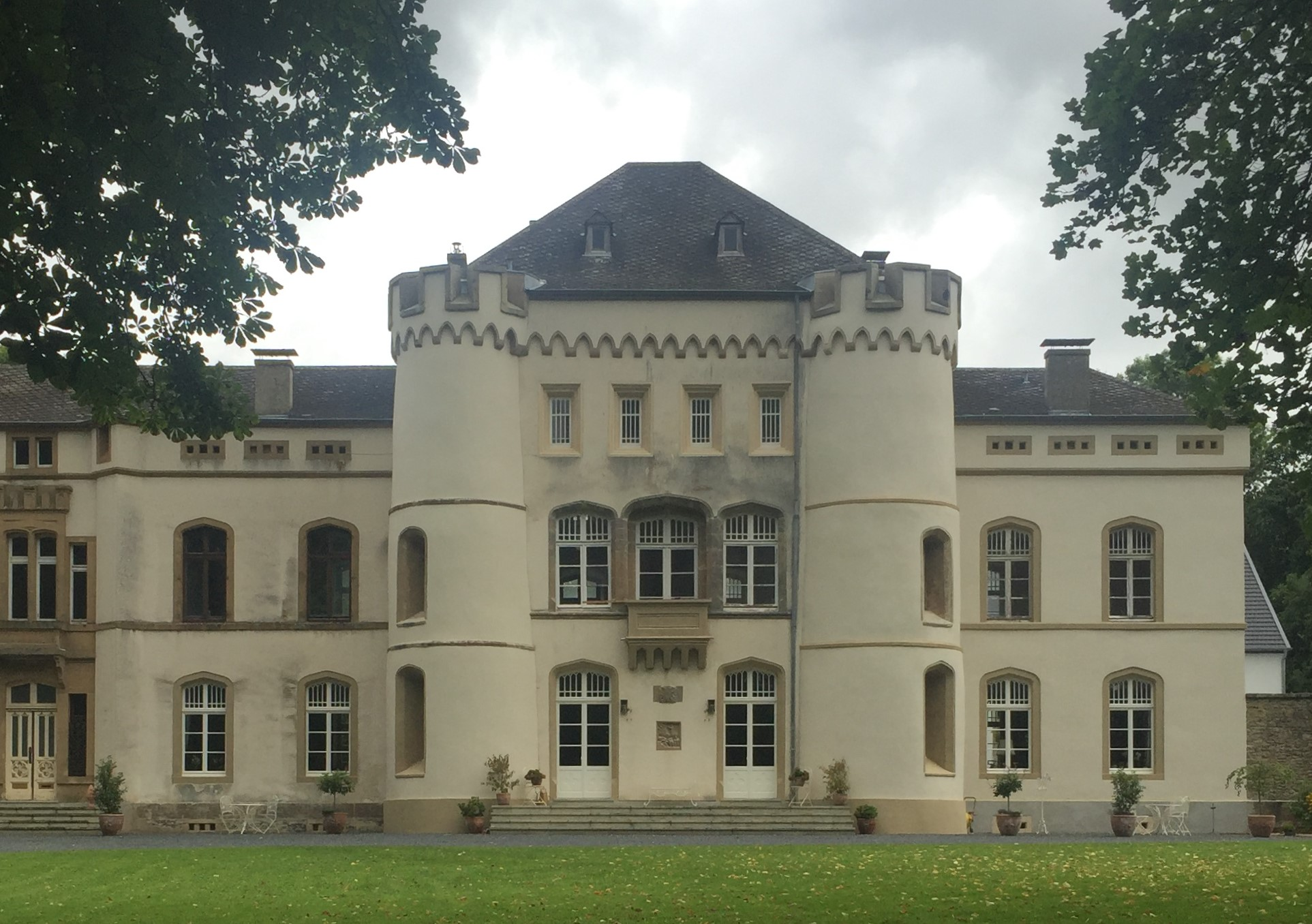 Sloss Kewenig junto a Körperich